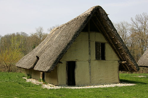 Gletterens: village lacustre